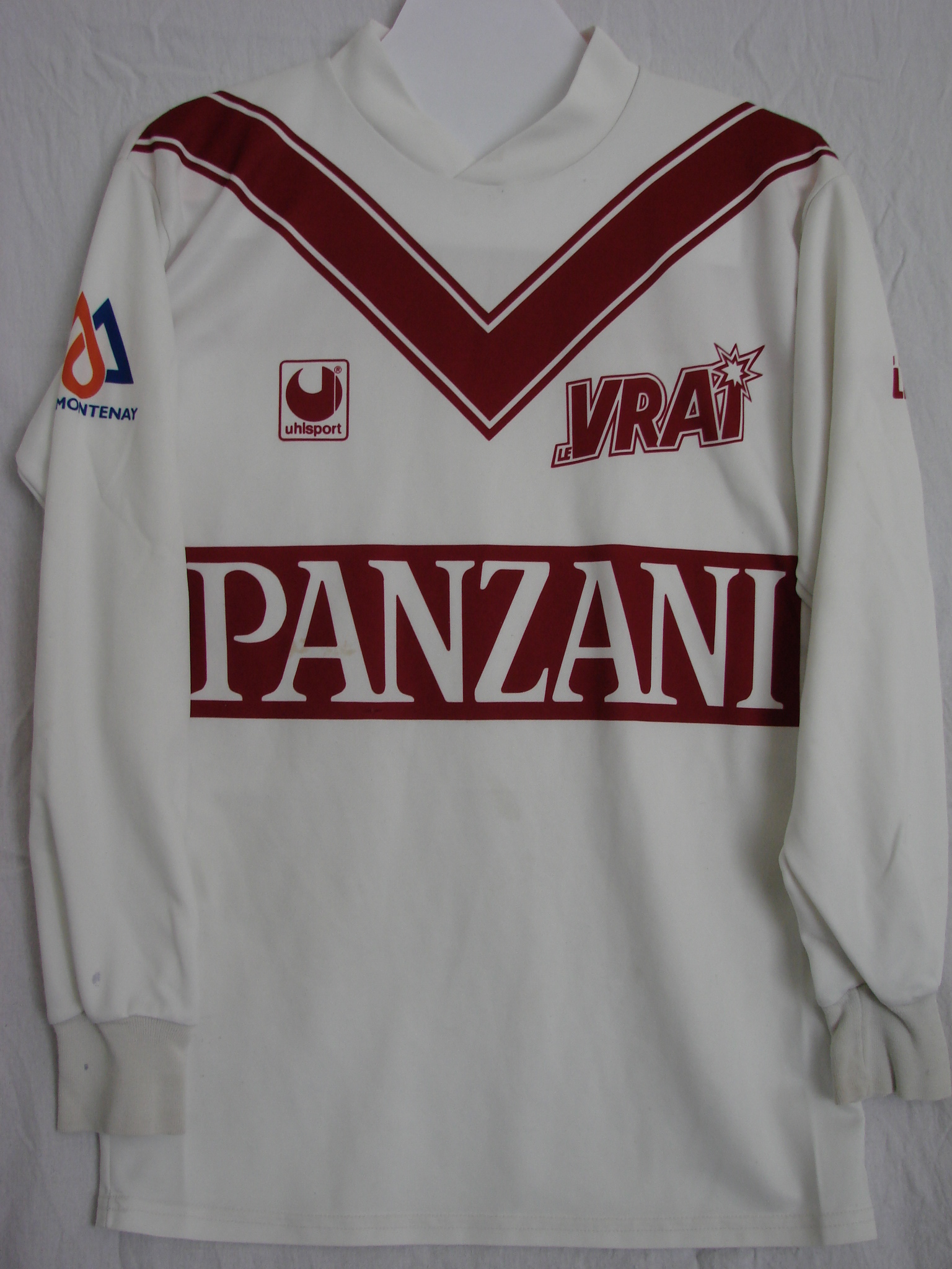 Maillot des Girondins de Bordeaux de 1992